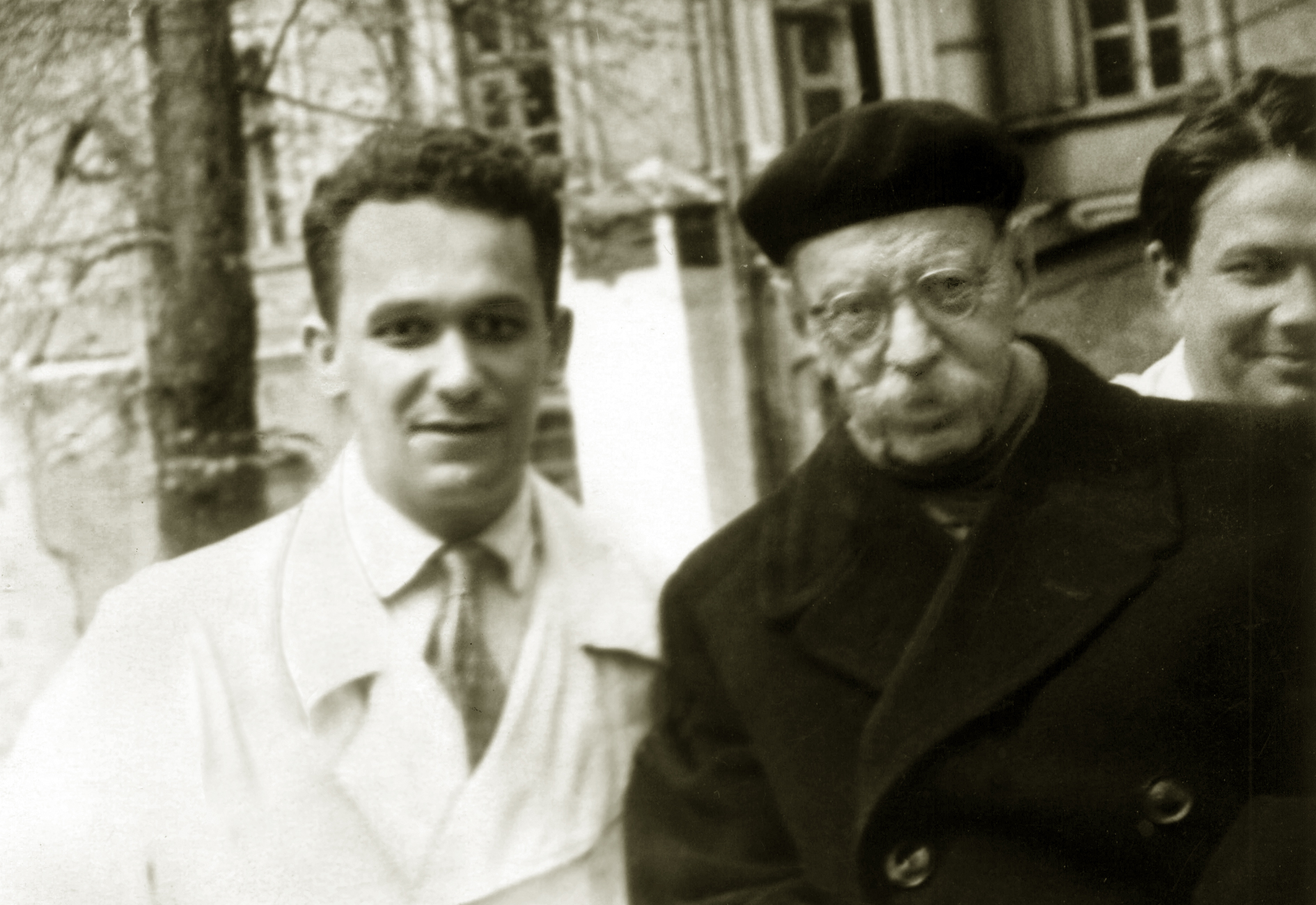 Академик М. С. Маслов и будущий начальник кафедры детских болезней ВМА А. И. Клиорин